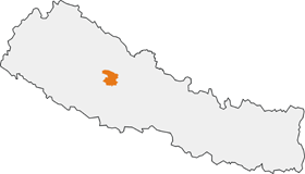 Położenie Obwodu Łowieckiego Dhorpatan (Dhorpatan Hunting Reserve)